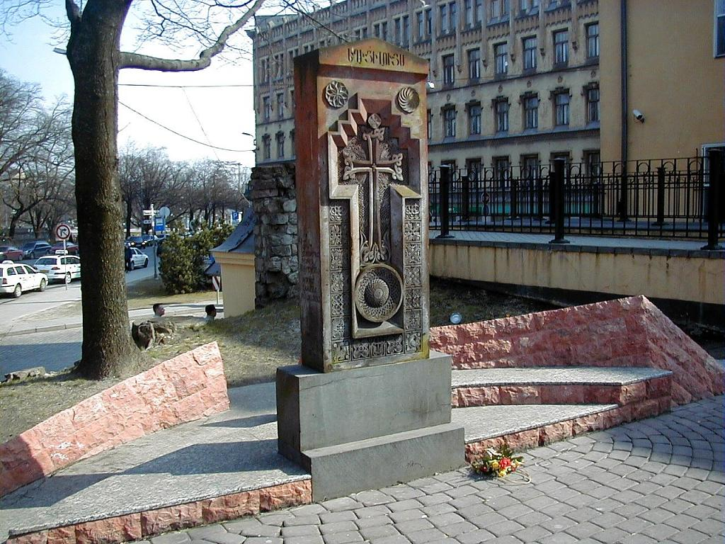 Rīga, piemineklis Hačkars 2004-04-08